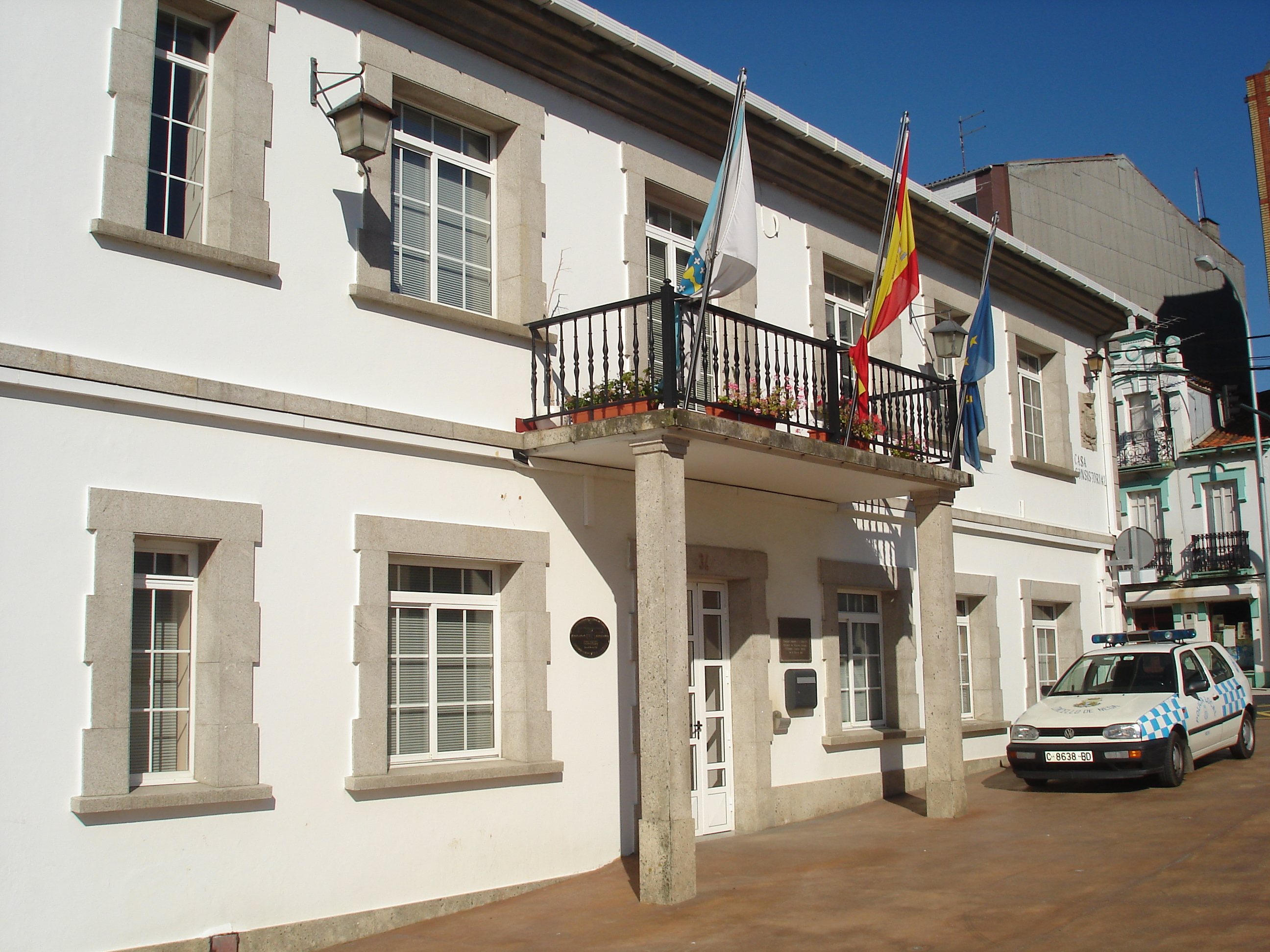 Casa do concello de Neda Neda Categoría:Imaxes de Neda